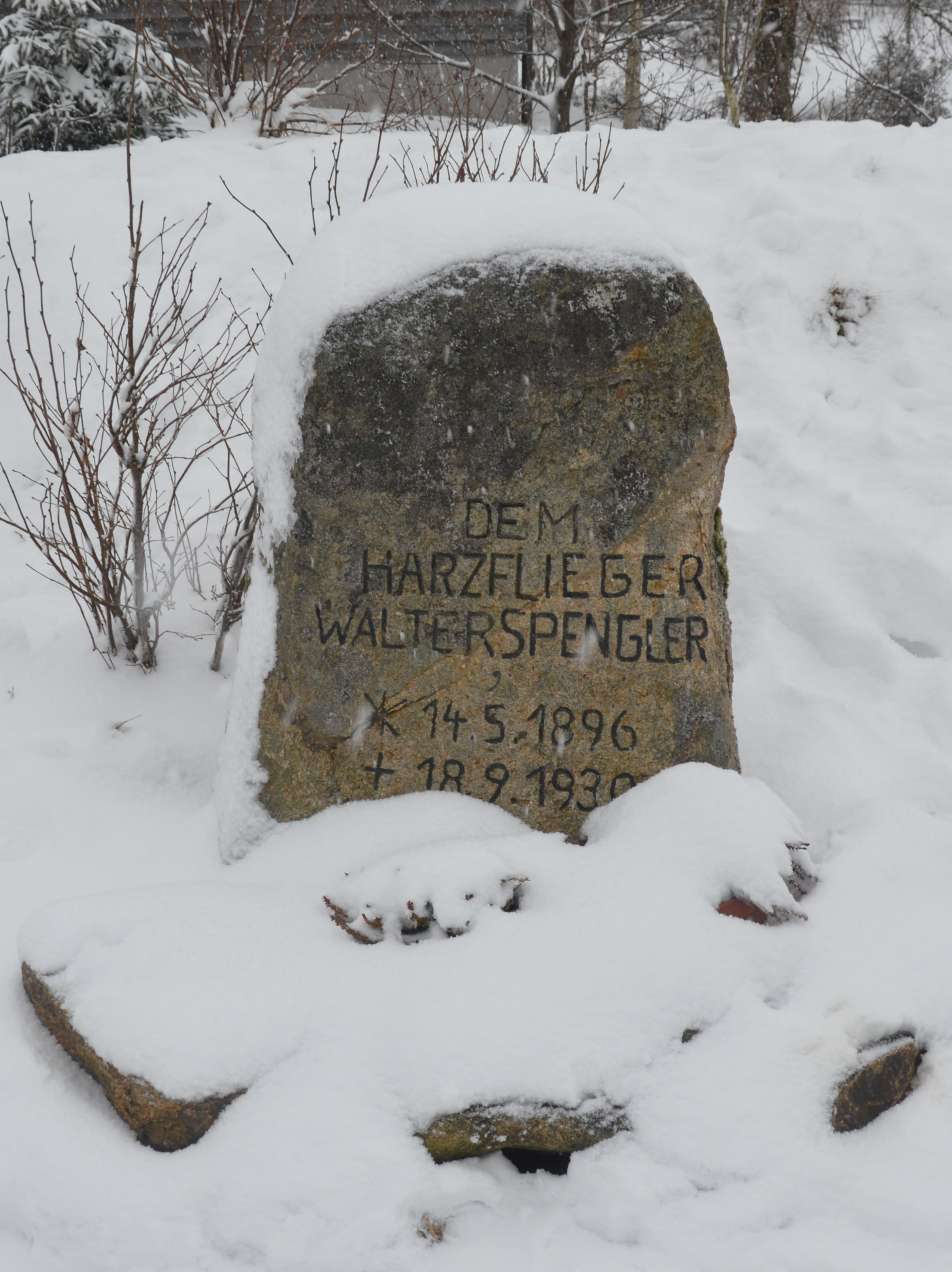 Gedenkstein Harzflieger